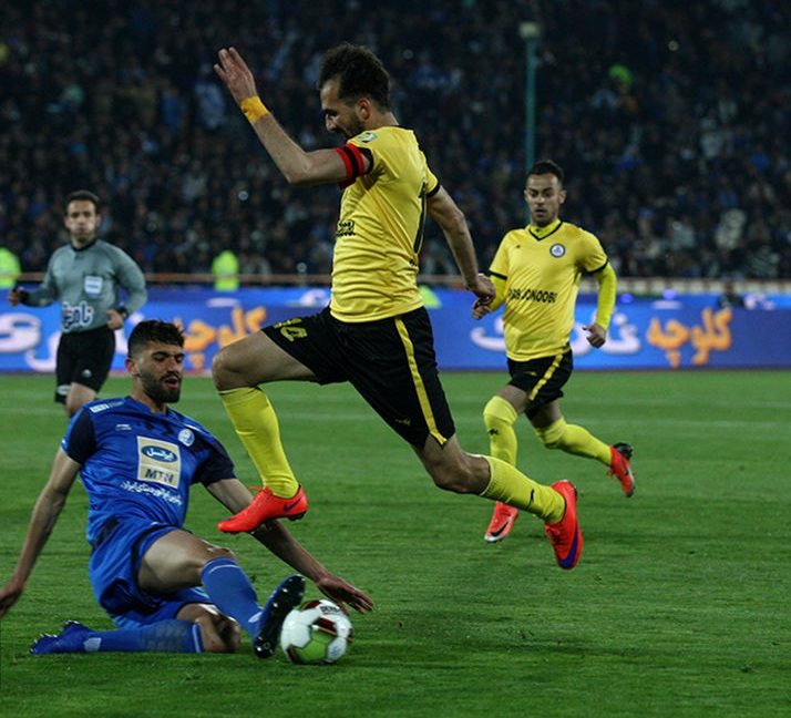 صحنه‌ای از تکل از کنار محمد دانشگر (بازیکن آبی‌پوش) روی پای محمد نوری (بازیکن زرد پوش) در بازی استقلال مقابل پارس جنوبی جم